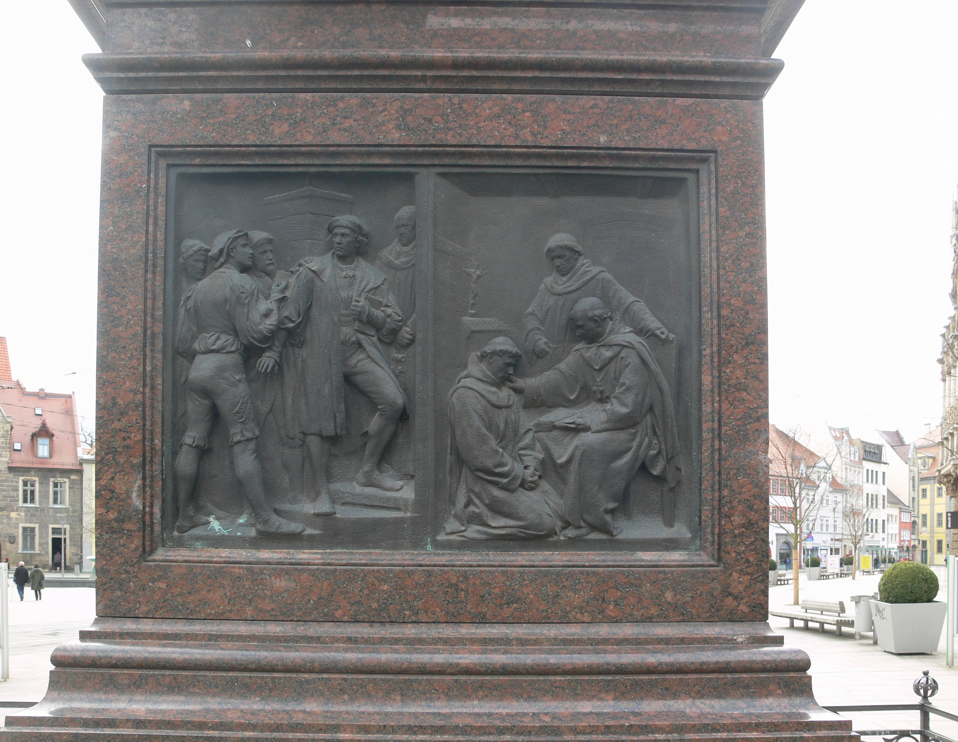 Erfurt, Lutherdenkmal vor der Kaufmannskirche am Anger